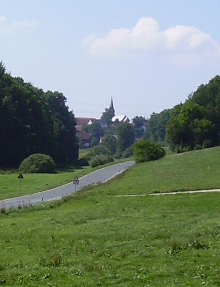 Tiefenpölz near Bamberg (Franconia)